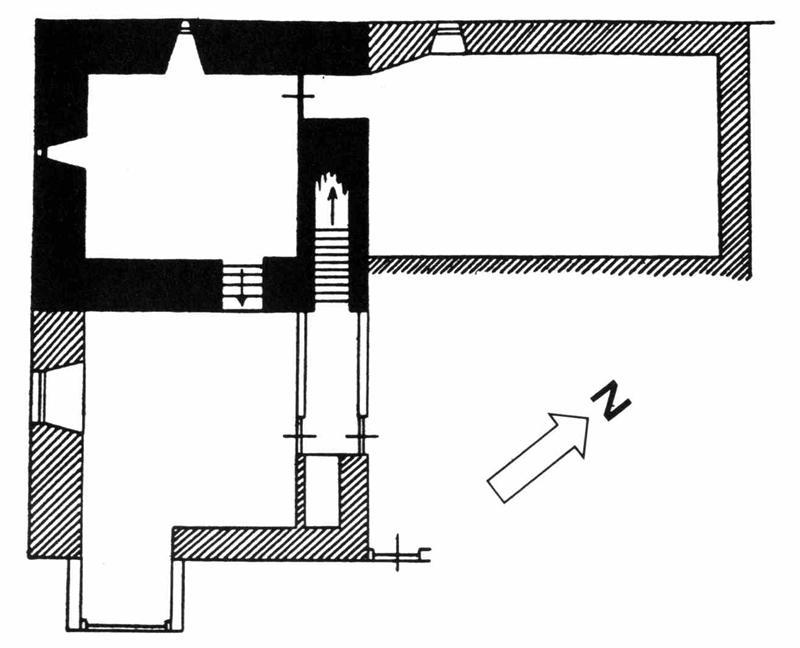 Huis Rijswijk Groessen plattegrond